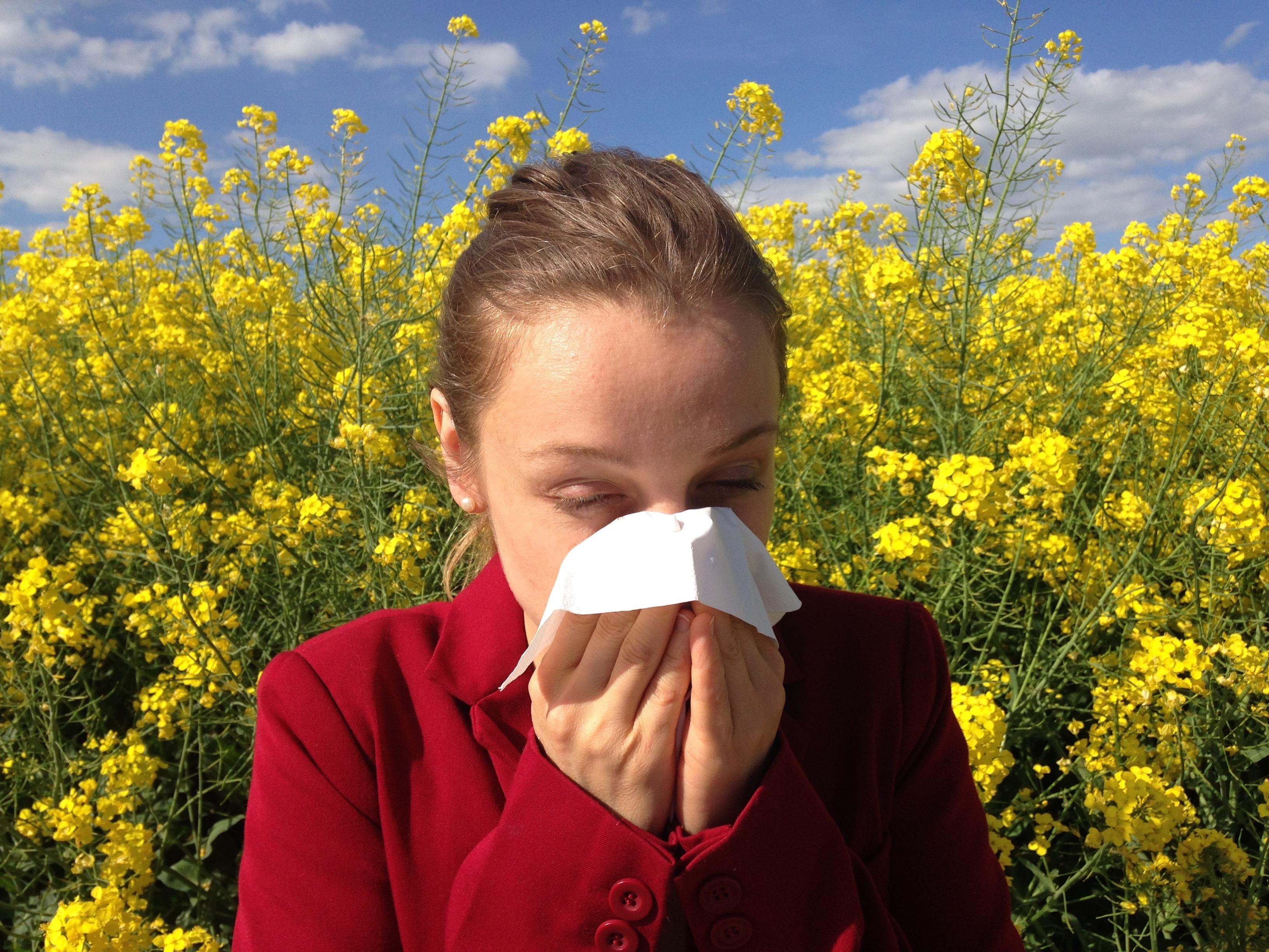 Alergije su jedna od najrasprostranjenijih bolesti modernog doba